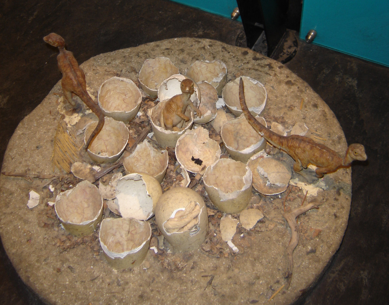 Nid d'Orodromeus (Ornithopoda) (image personnelle)